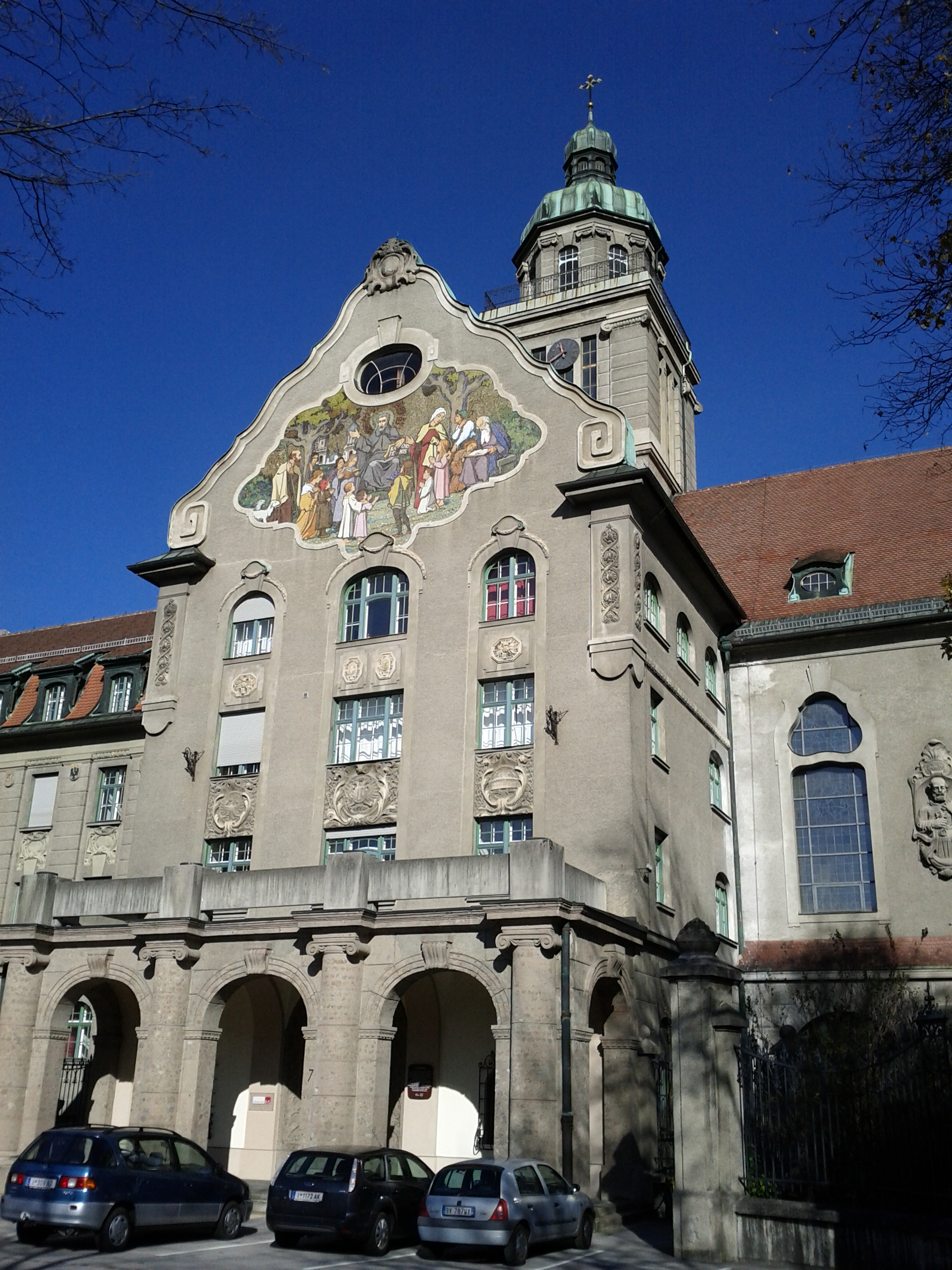 Seminar, Canisianum mit Kirche und Einfriedung: Tschurtschenthalerstraße 7 in Innsbruck